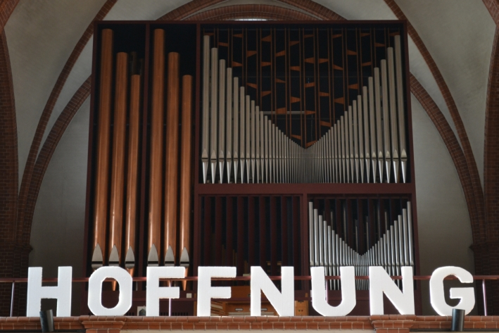 Hauptorgel der Reformationskirche in Berlin Moabit. Erbaut 1968 von Detlef Kleuker. 36 Register, 3 Manuale und Pedal.